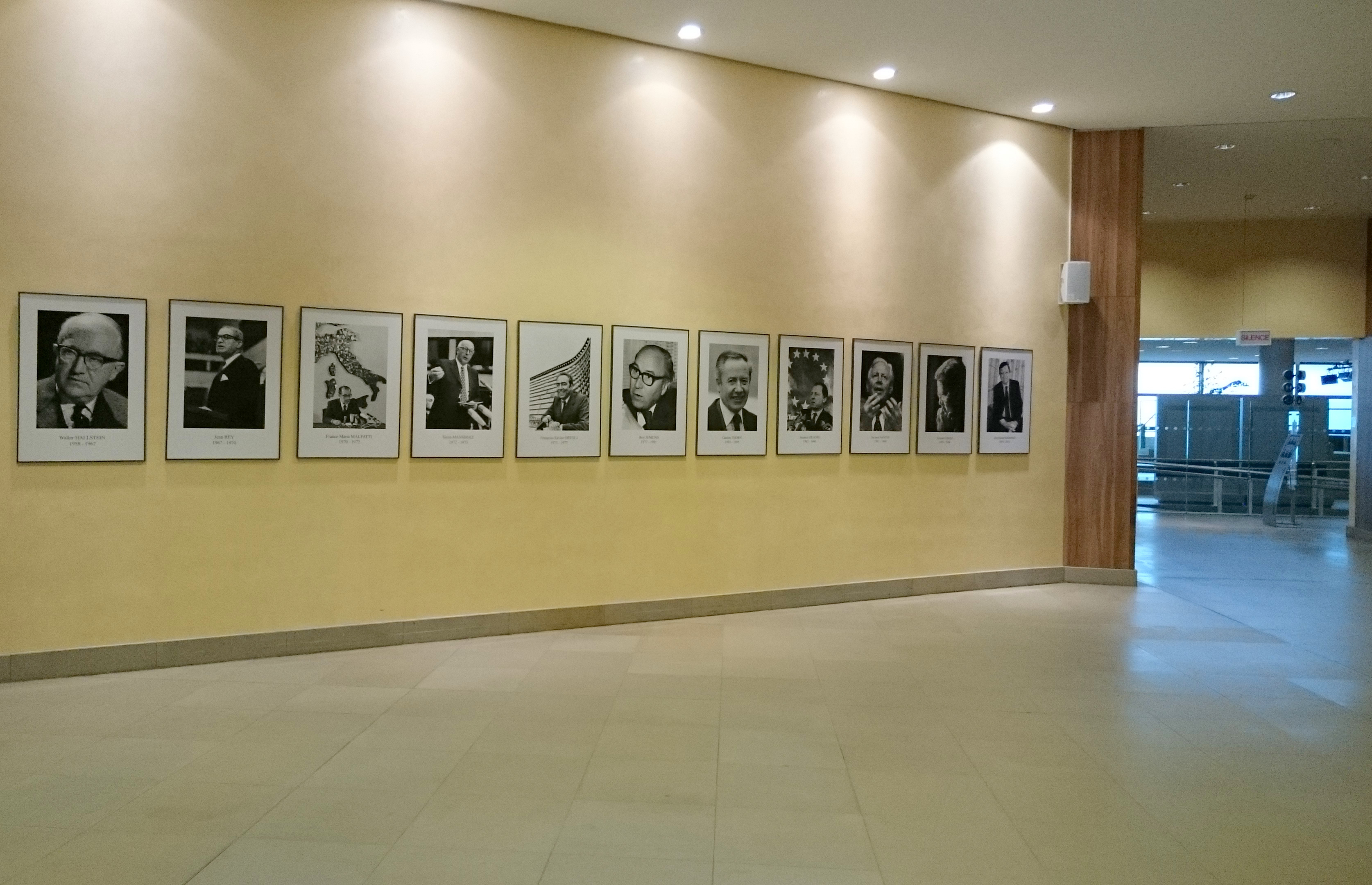 Photo des présidents de la Commission, près de l'entrée du Berlaymont.